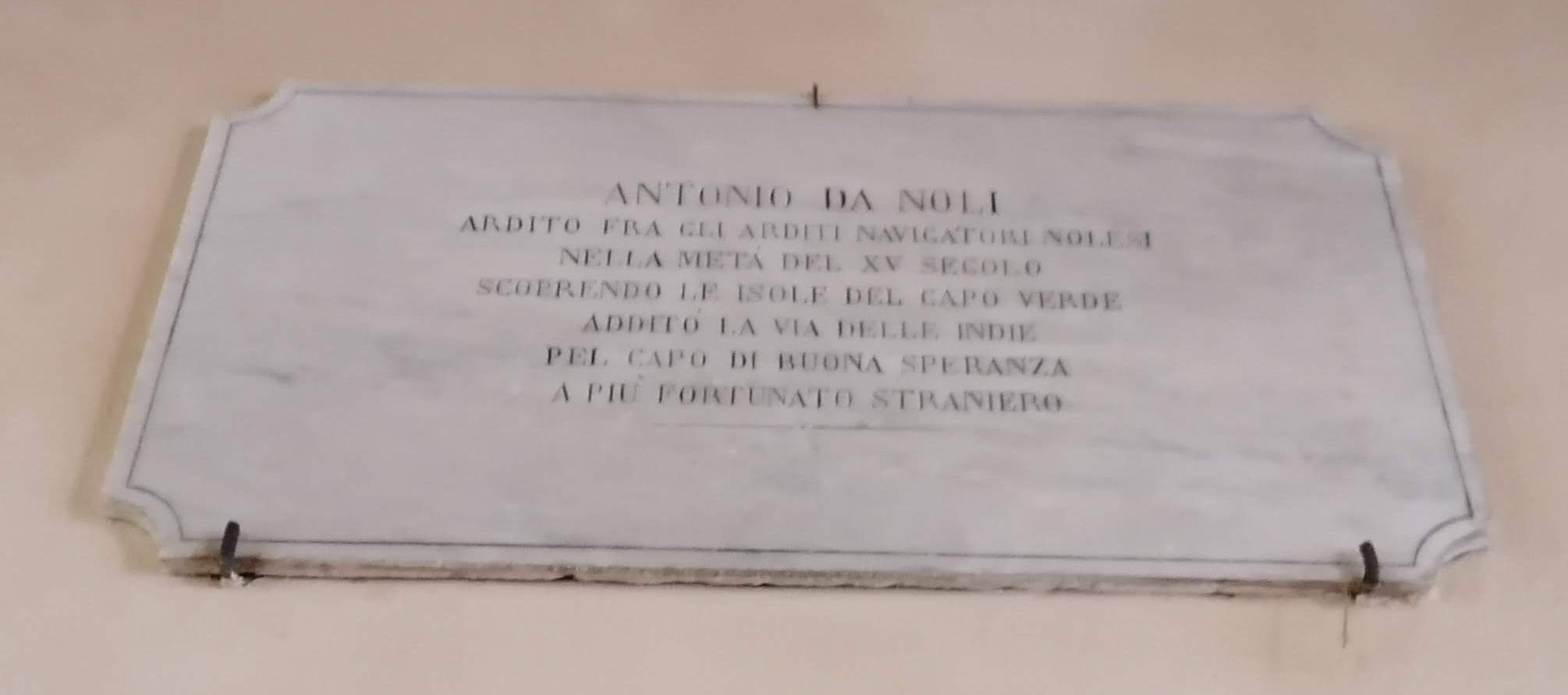 Targa commemorativa di Antonio da Noli nella Loggia della Repubblica Nolese.